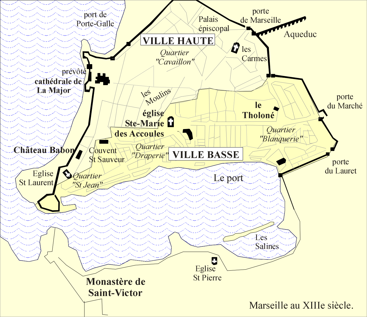 Marseille ville médiévale